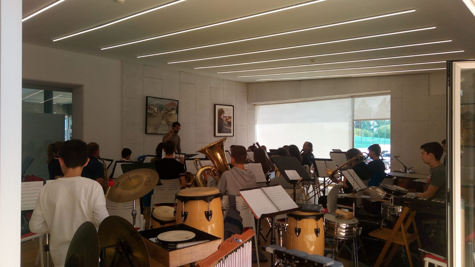 Ensaio da Banda Xuvenil da Escola da Agrupación Musical de Goián